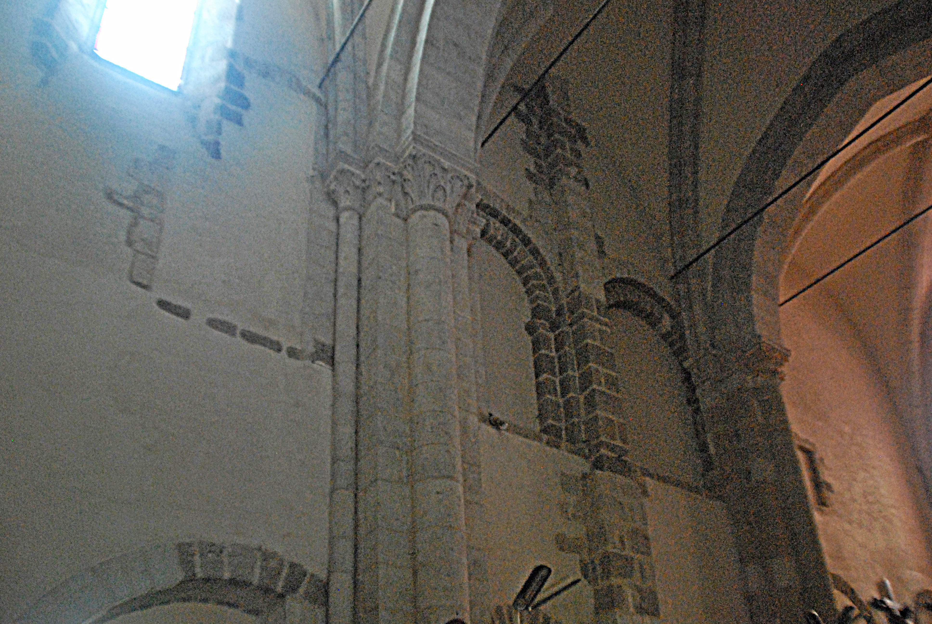 Neuvy_St.-Sépulcre, Basilika, Mittelschiff, NO-Wand, Joche 1-3